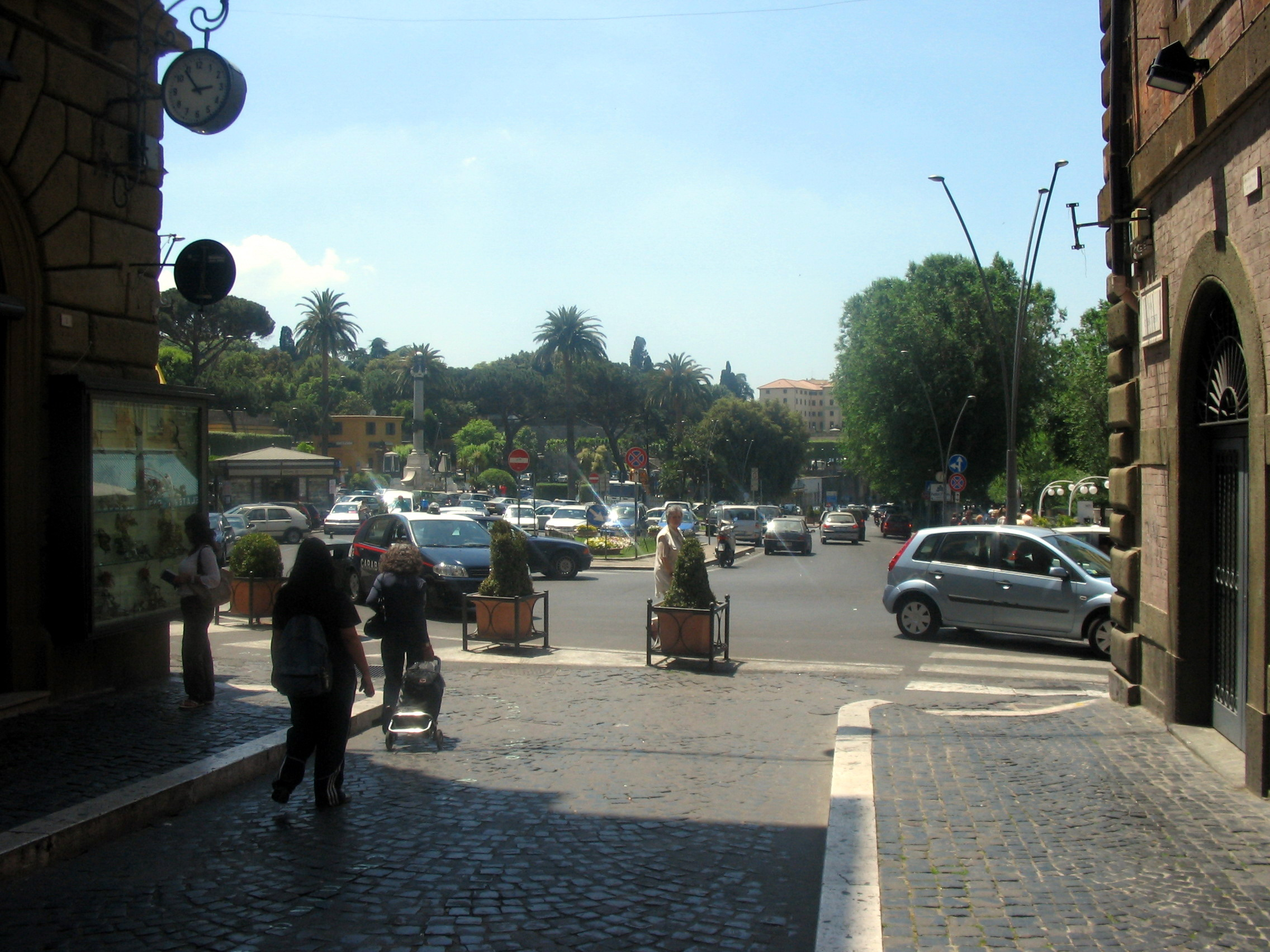 Frascati, Lazio, Italia